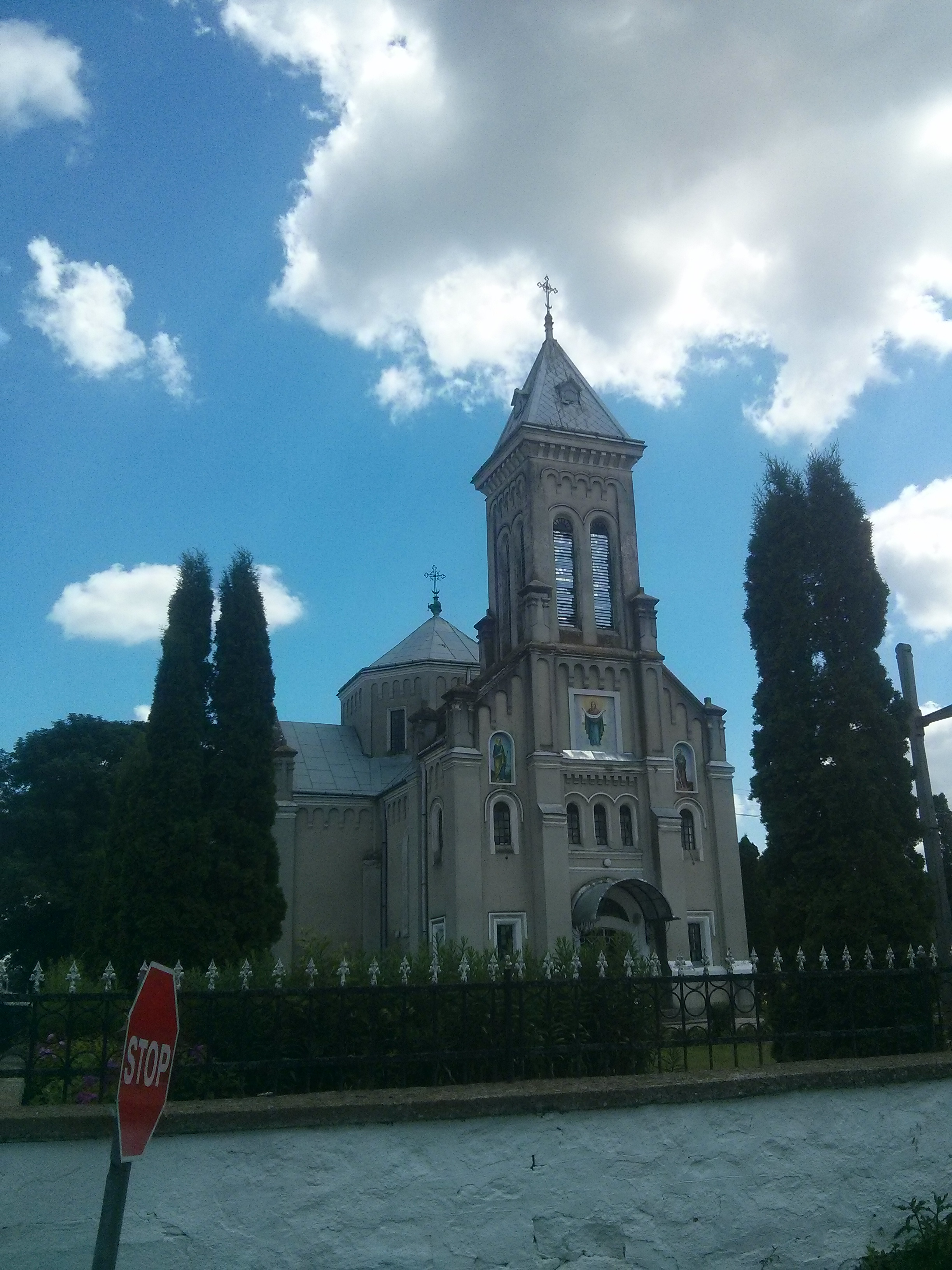 Церква Св. Покрови, Сороцьке